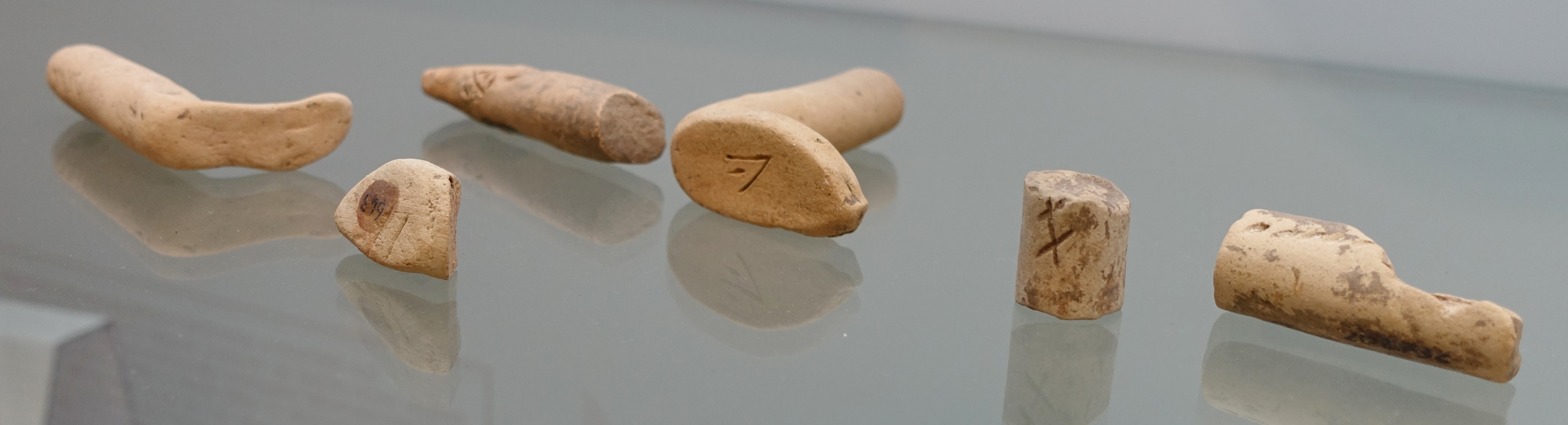 Votivgaben (2. bis 1. Jahrhundert v. Chr.) aus der Ausgrabung von Cuccureddus, ausgestellt im archäologischen Museum von Villasimius, Sardinien, Italien